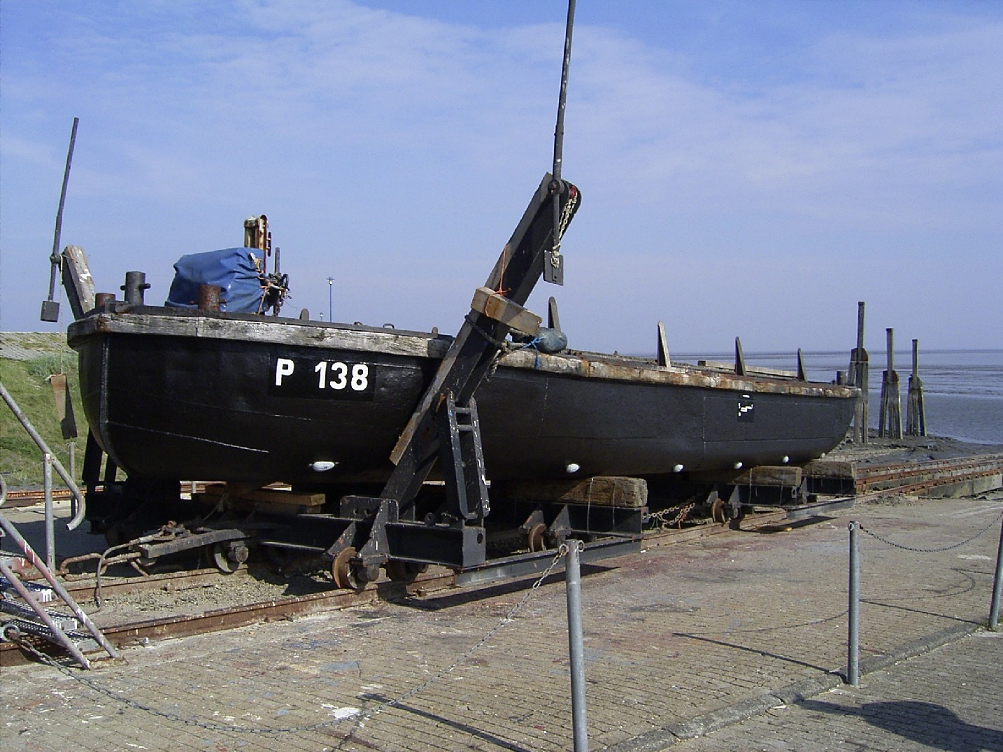 Prahm auf Slip in Neuharlingersiel